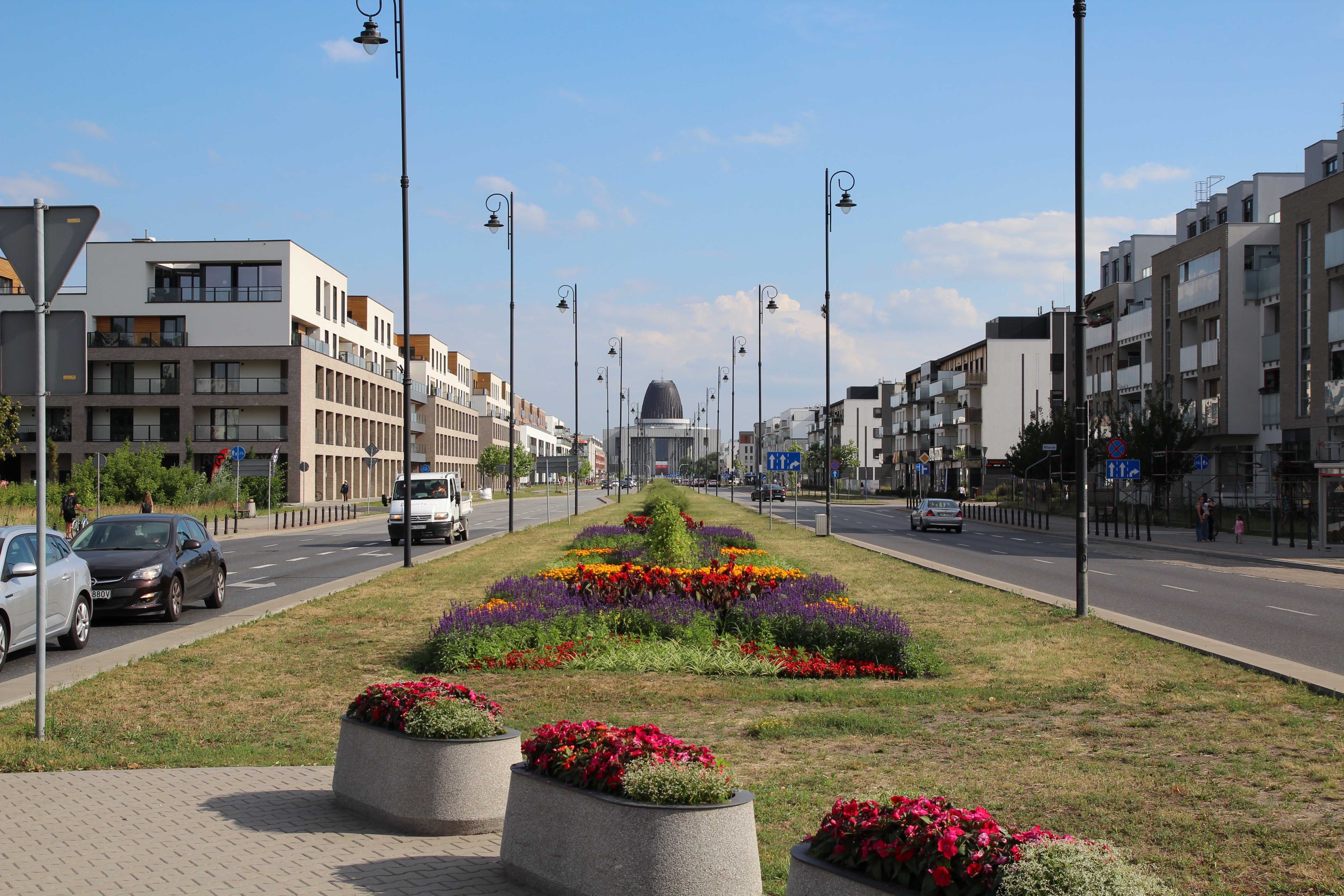 Rzeczypospolitej, Wilanowska, view to temple